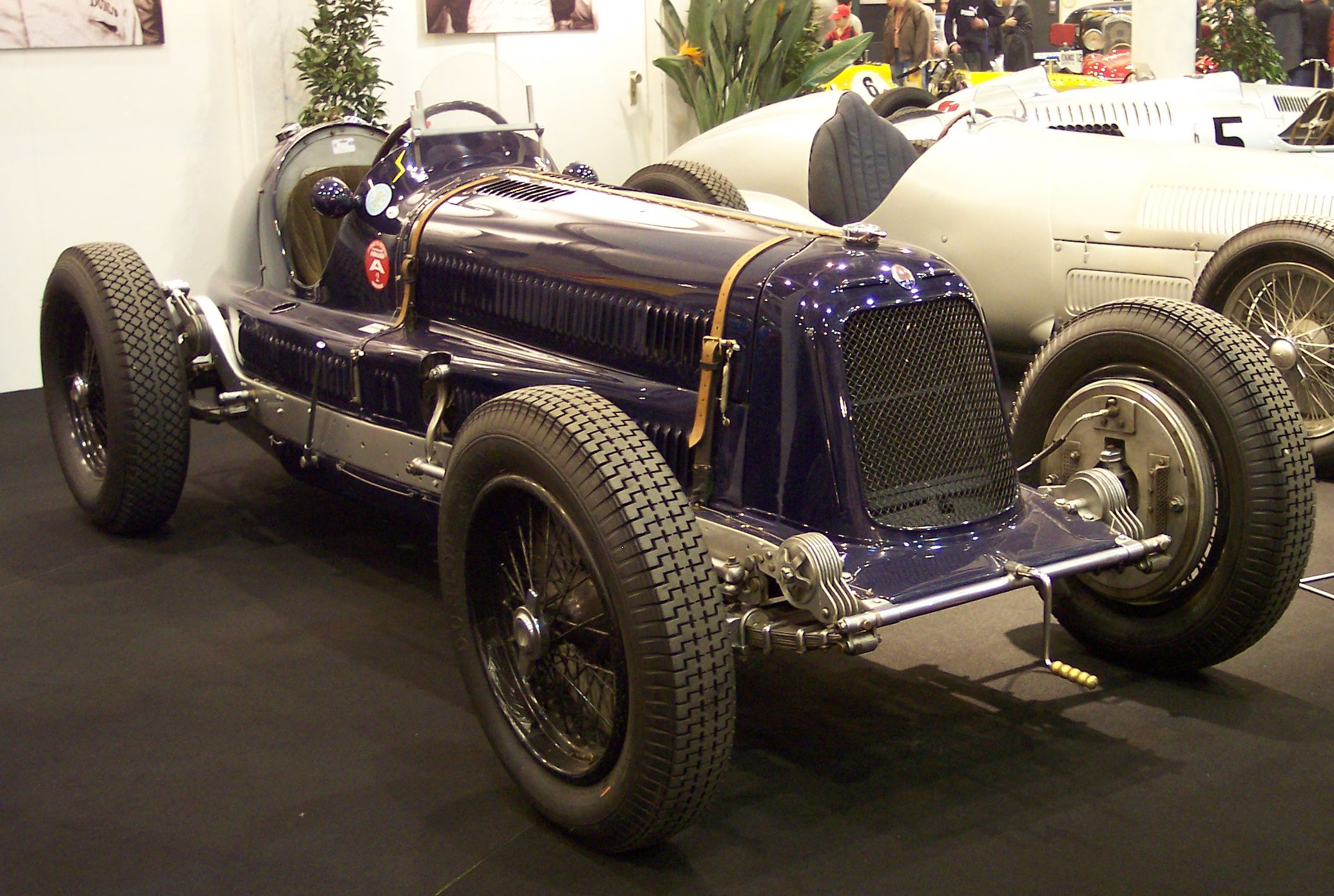 Source: Eigenes Bild